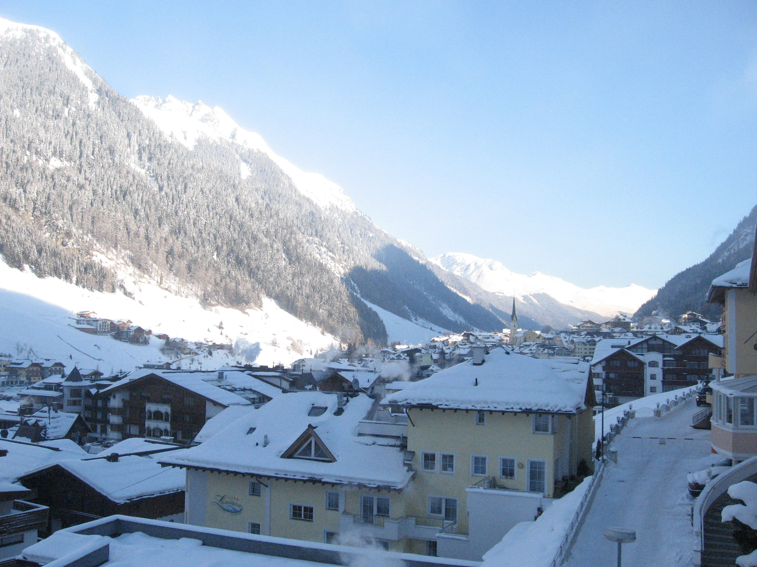 עיירת הסקי אישגל